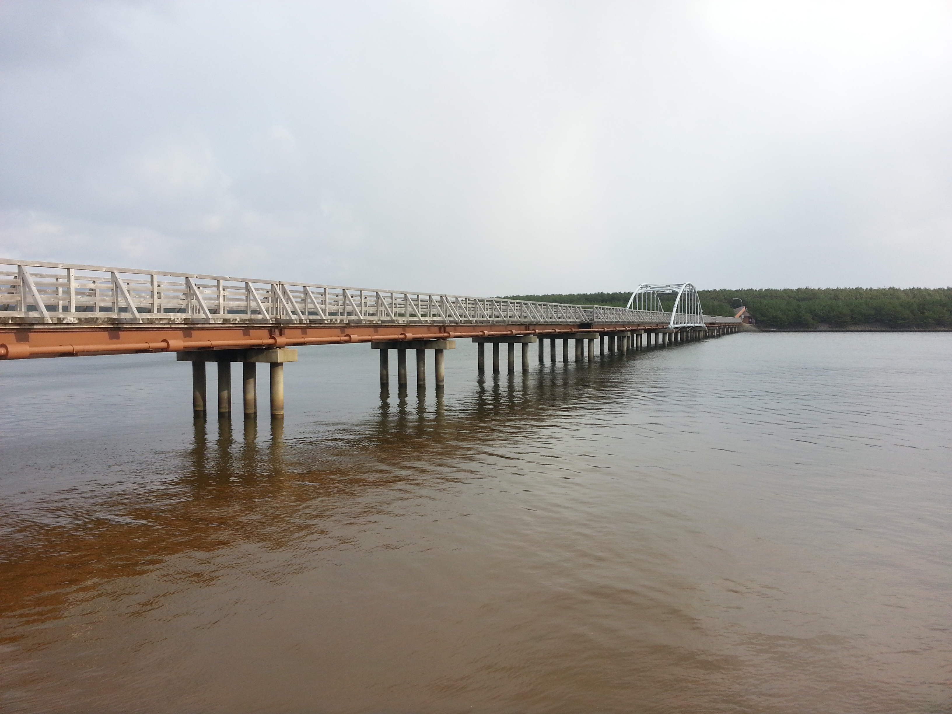 青森県の十三湖に浮かぶ「中の島ブリッジパーク」と青森県道12号側を結ぶ、中の島遊歩道橋。